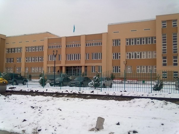 Лицей